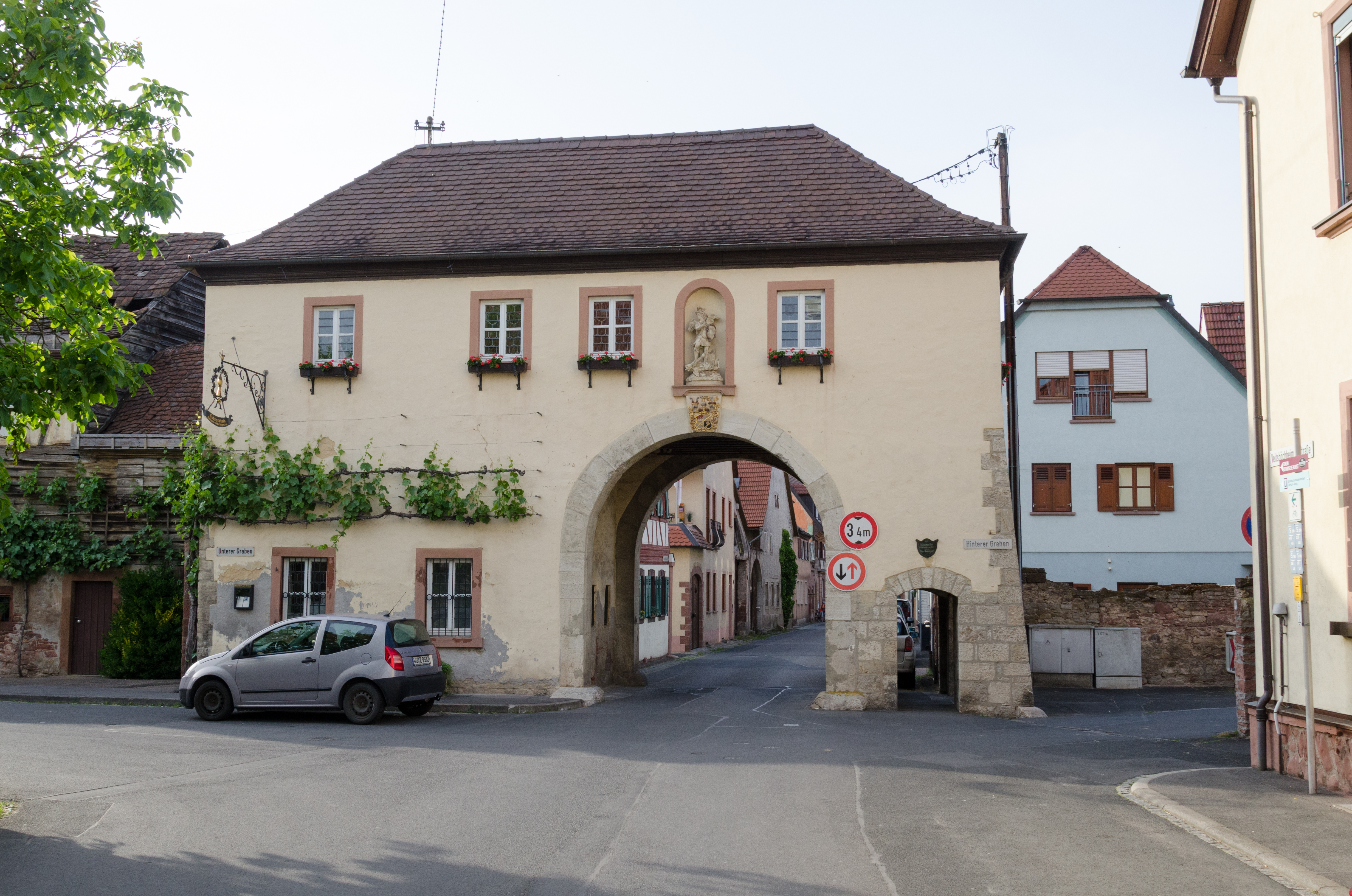 Thüngersheim, Würzburger Tor